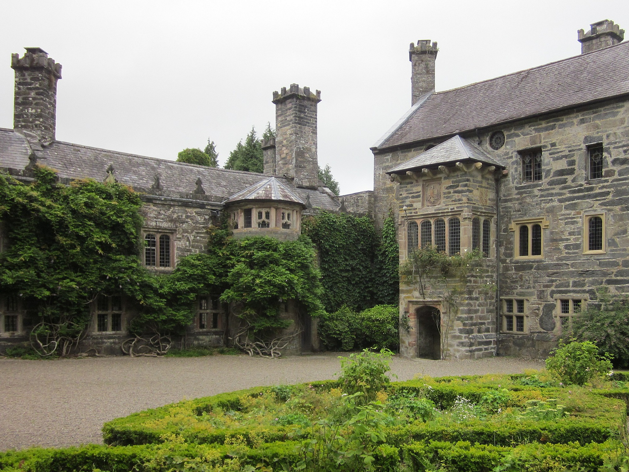 Gwydir Castle - Wales